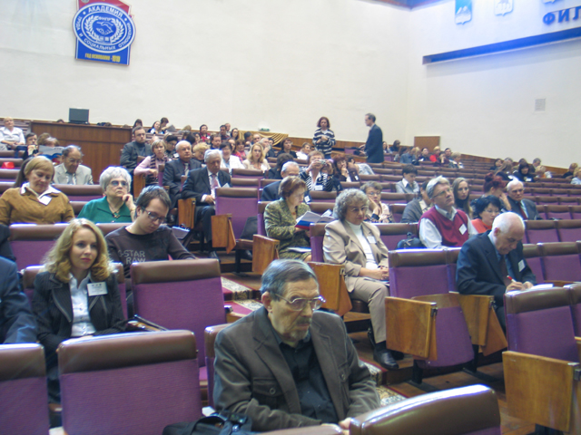 Фотография с конференции "Образование и общество"